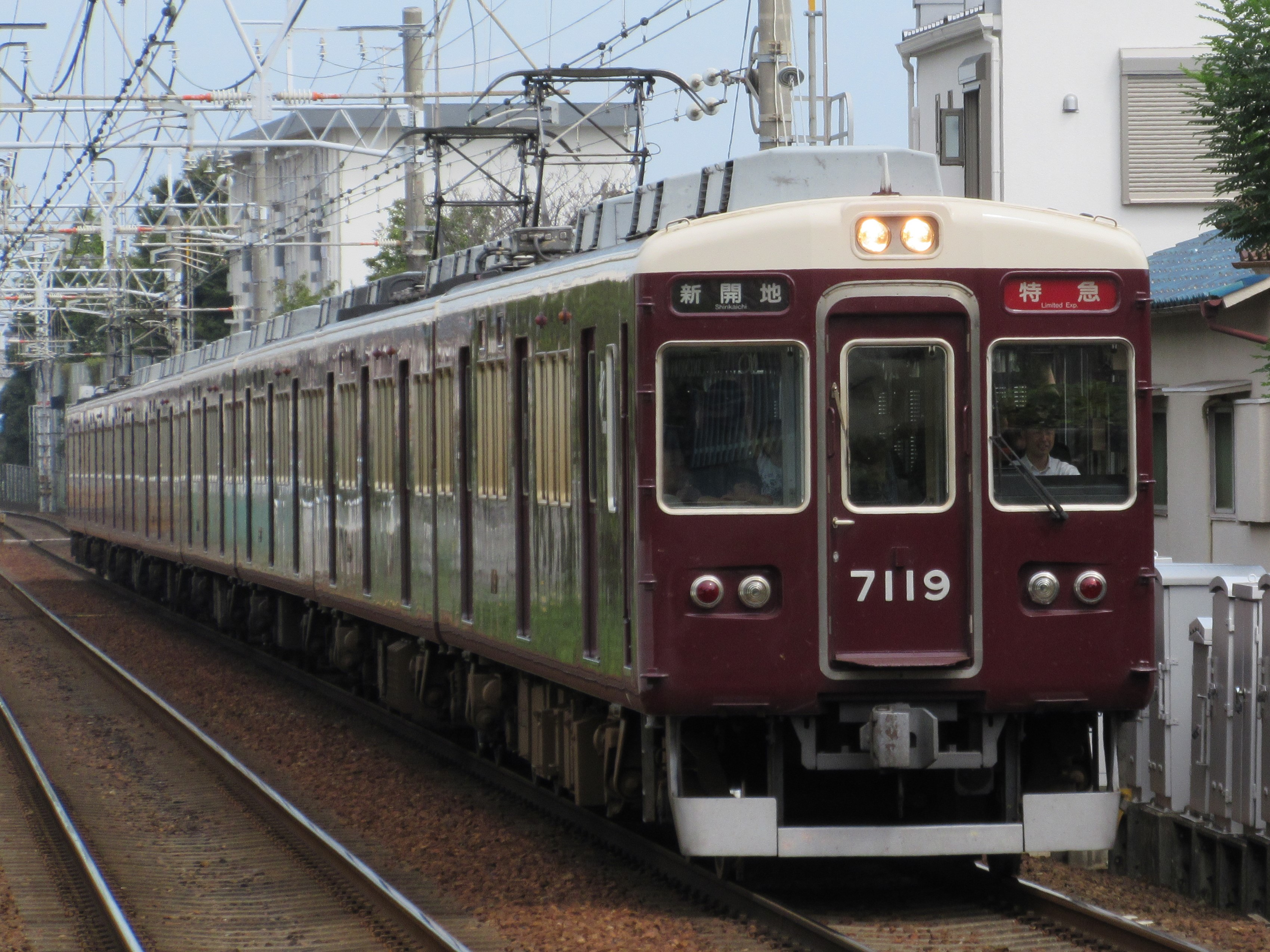 阪急電鉄7119 (岡本駅にて)